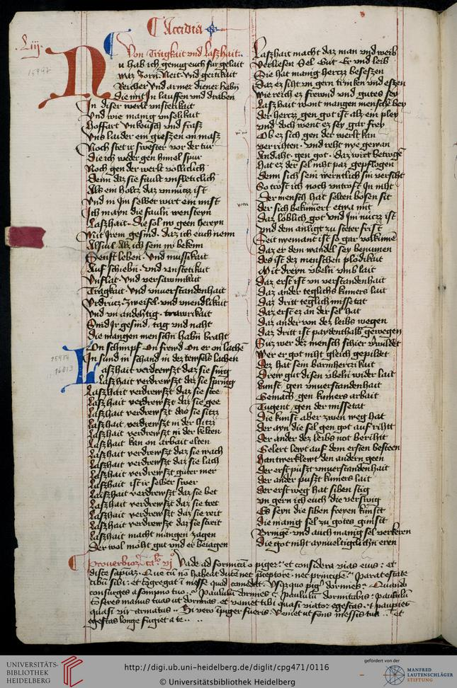 Hugo von Trimberg "Der Renner"